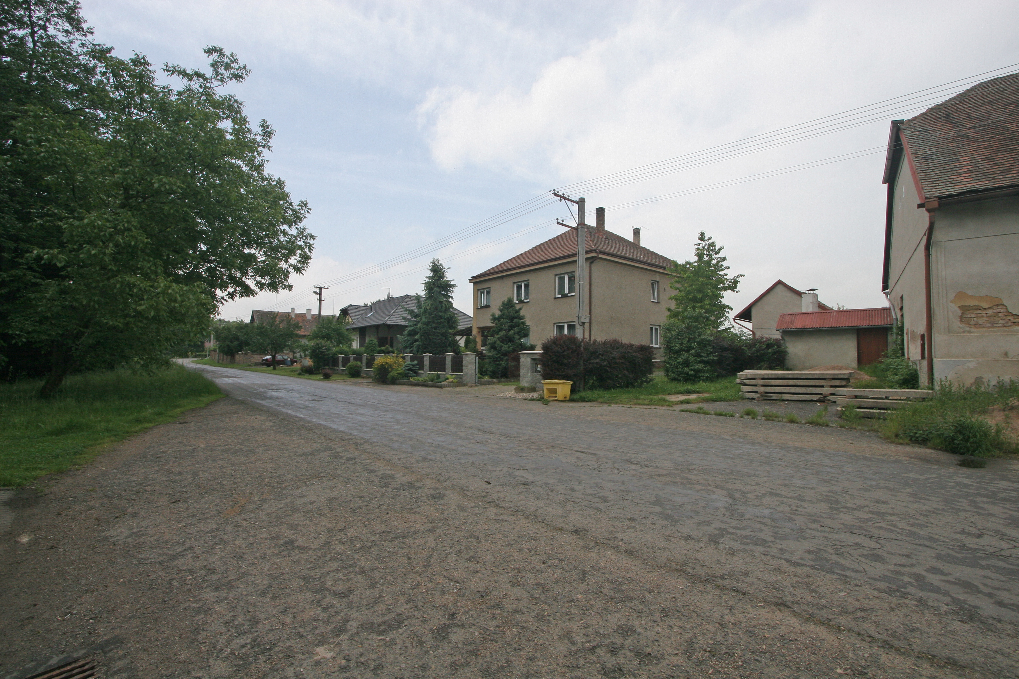 Lány čp. 104